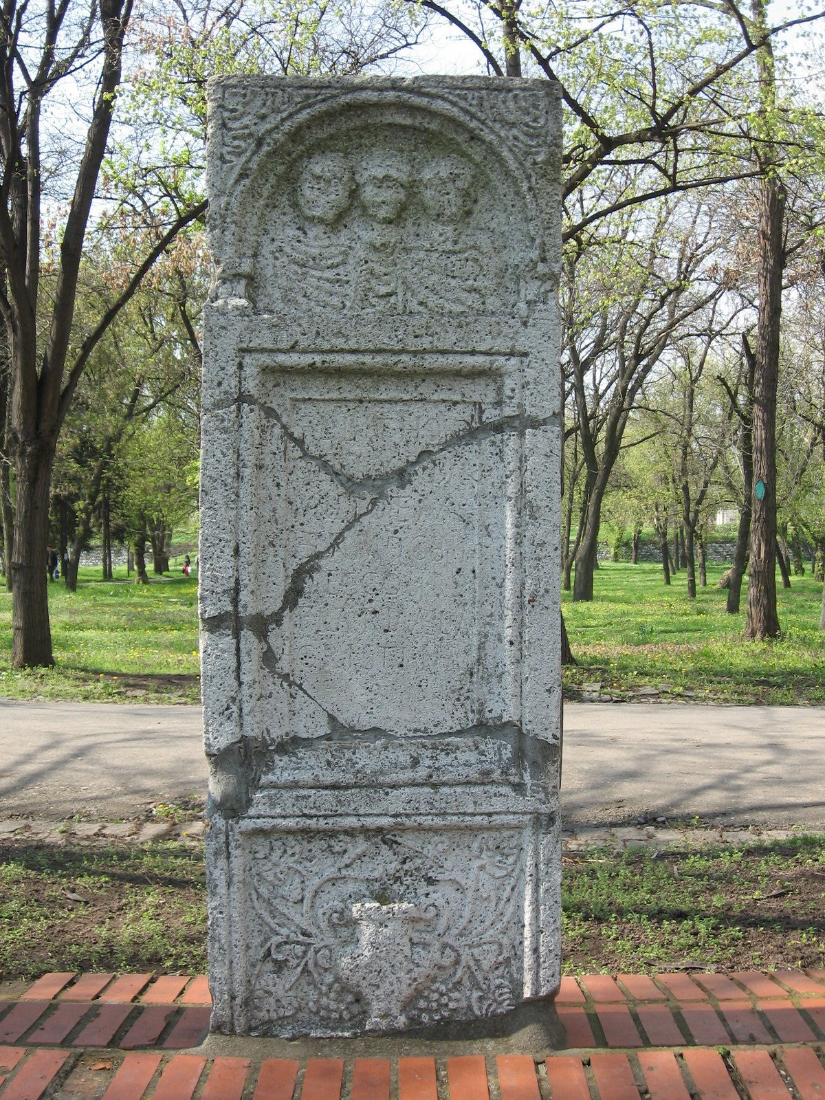 Липадаријум у Нишкој тврђави. Снимљено у априлу 2010.